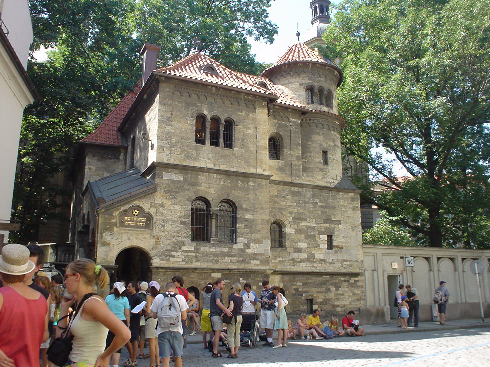 Questa foto rappresenta una vista della Casa delle cerimonie a Praga, è stata scattata da me, G. Salluzzi nell'agosto 2004 ed è rilasciata in Pubblico Dominio